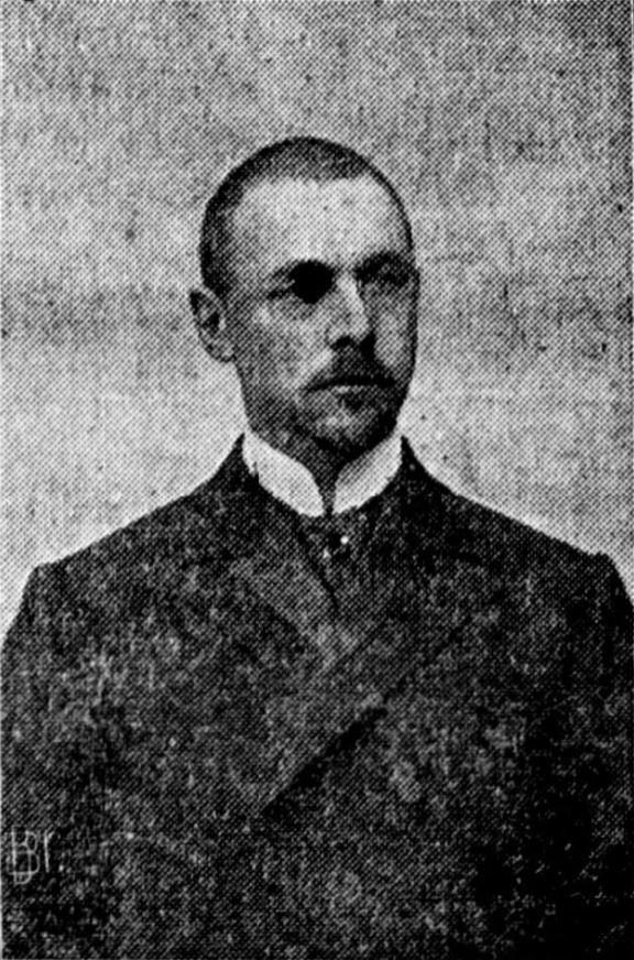 Edmund Harbitz, norsk advokat og politiker